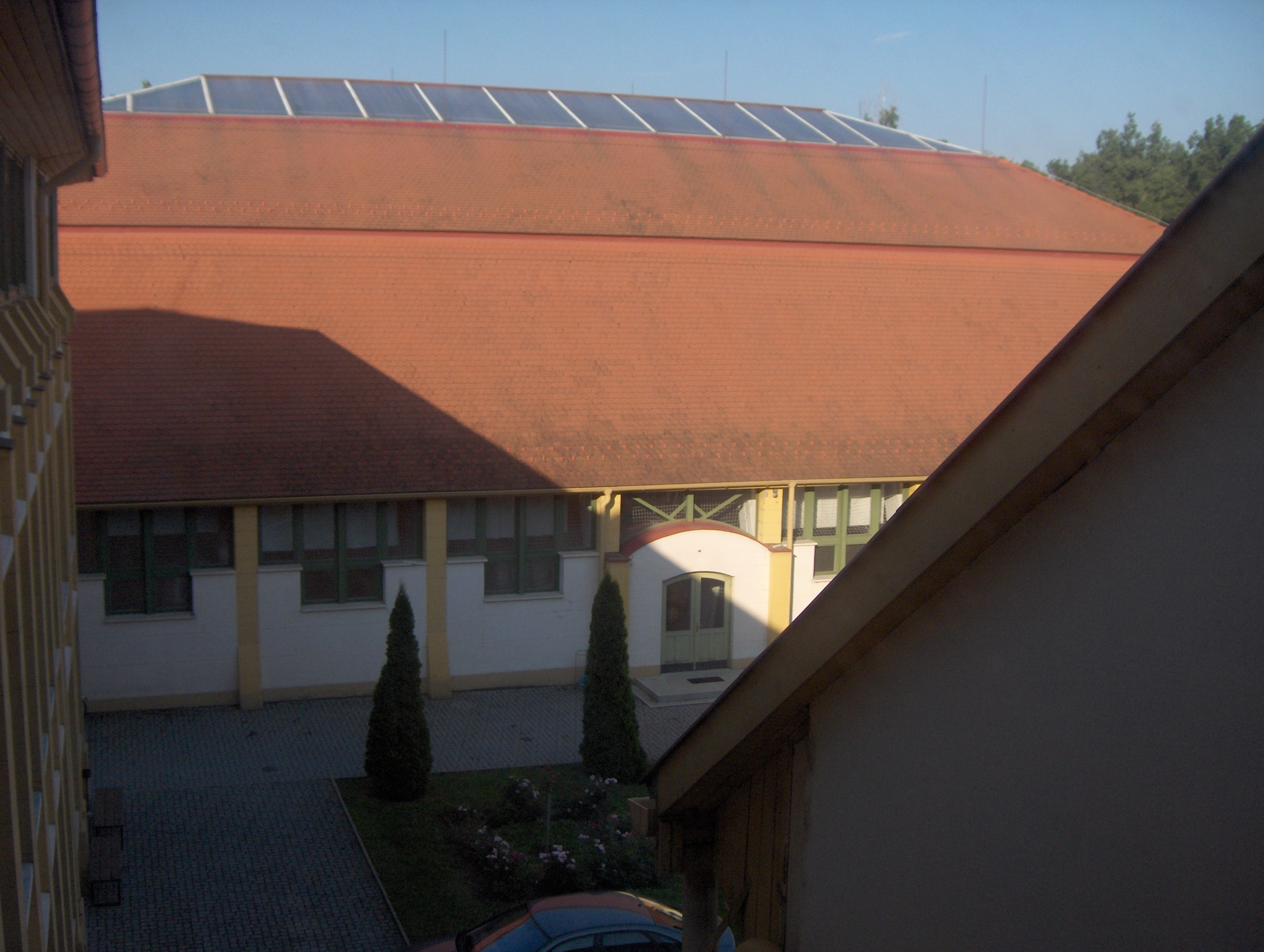 Bibó István Gimnázium tornaterme